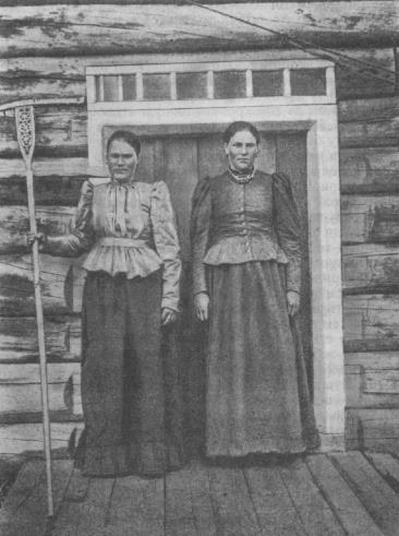 Народная сказительница Марфа Семёновна Крюкова с родной сестрой Павлиной